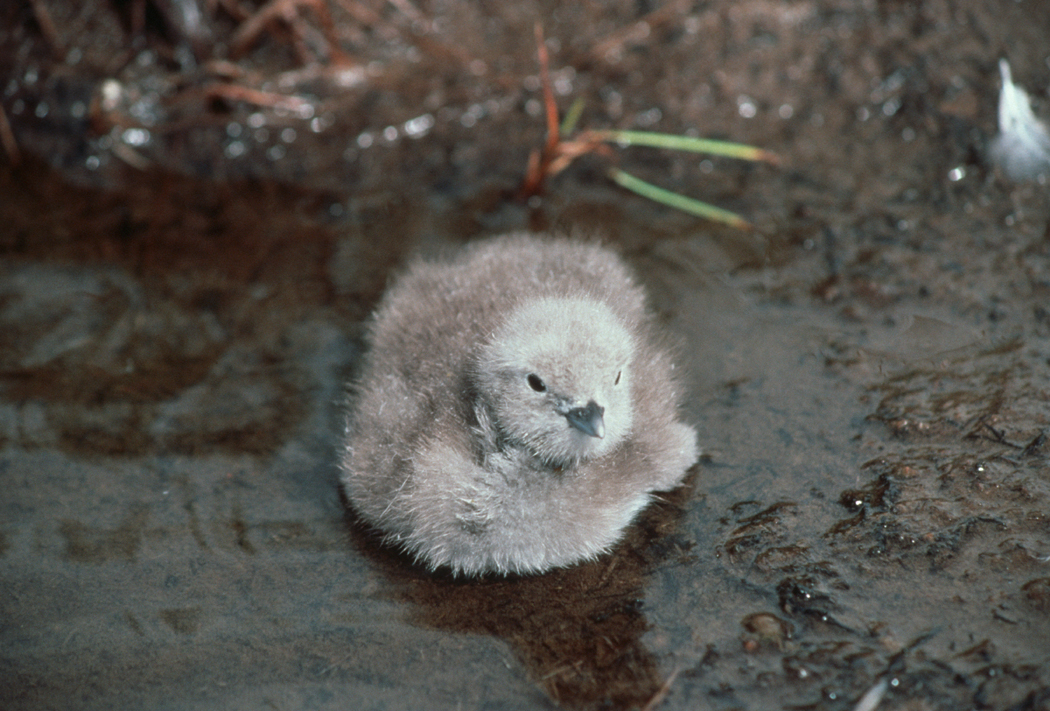 Pacific Loon (Gavia pacifica) chick